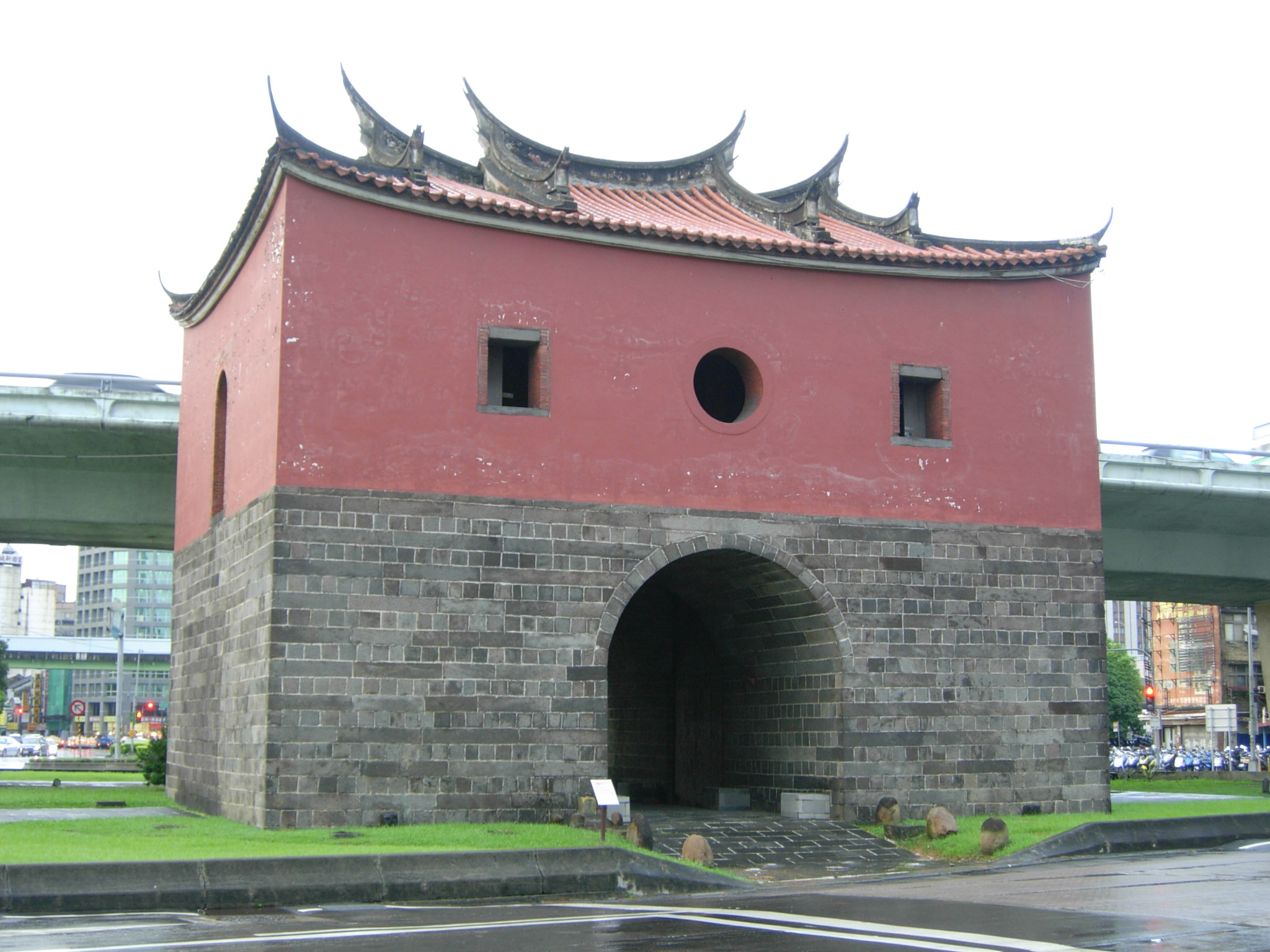 中文（台灣）: 台北府城北門Bân-lâm-gú: Tâi-pak hú-siânn Pak-mn̂g